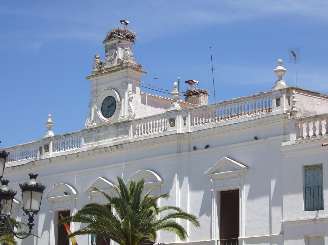 Ayuntamienta